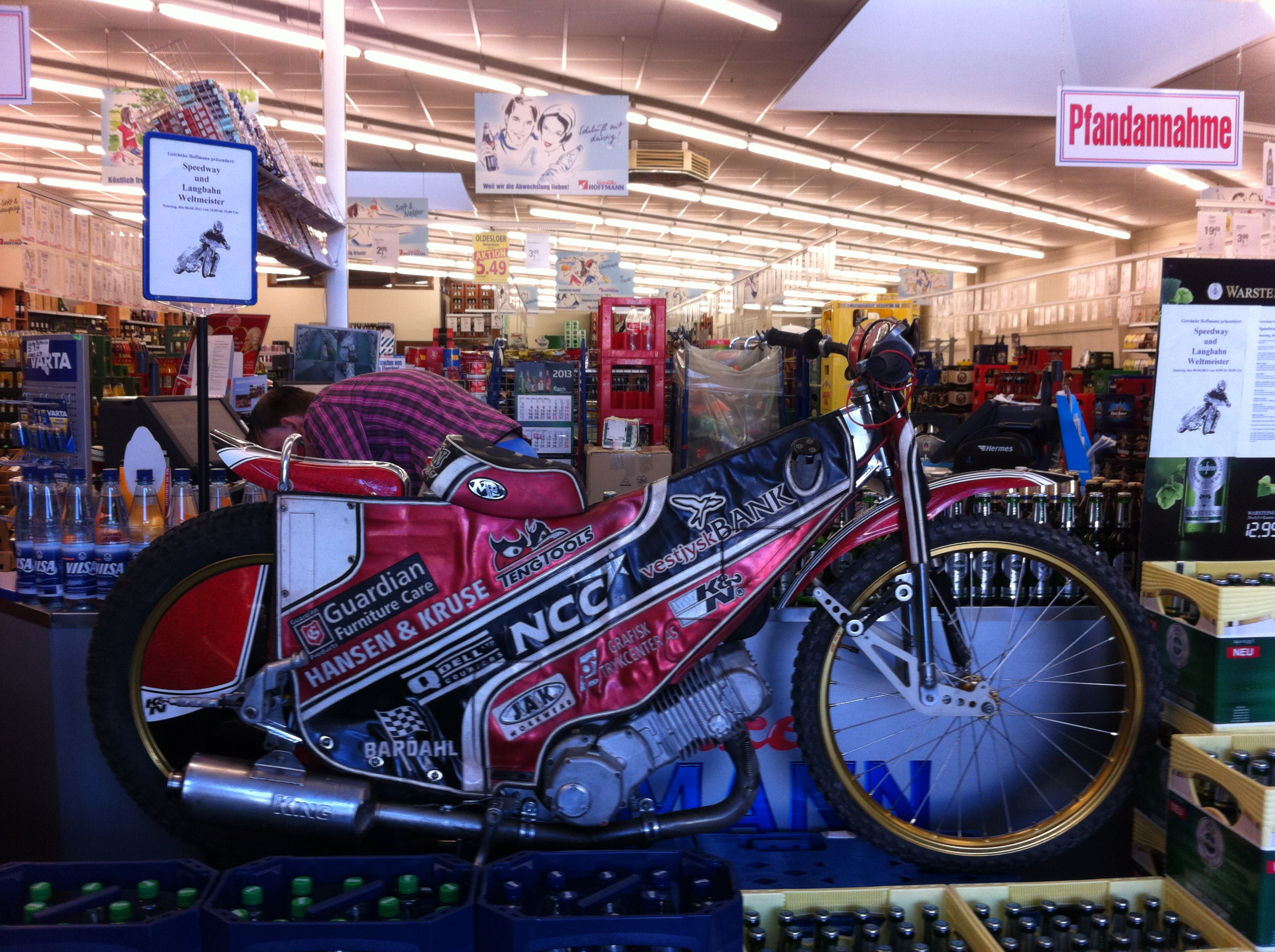 Originales Speedway-Bike von Egon Müller